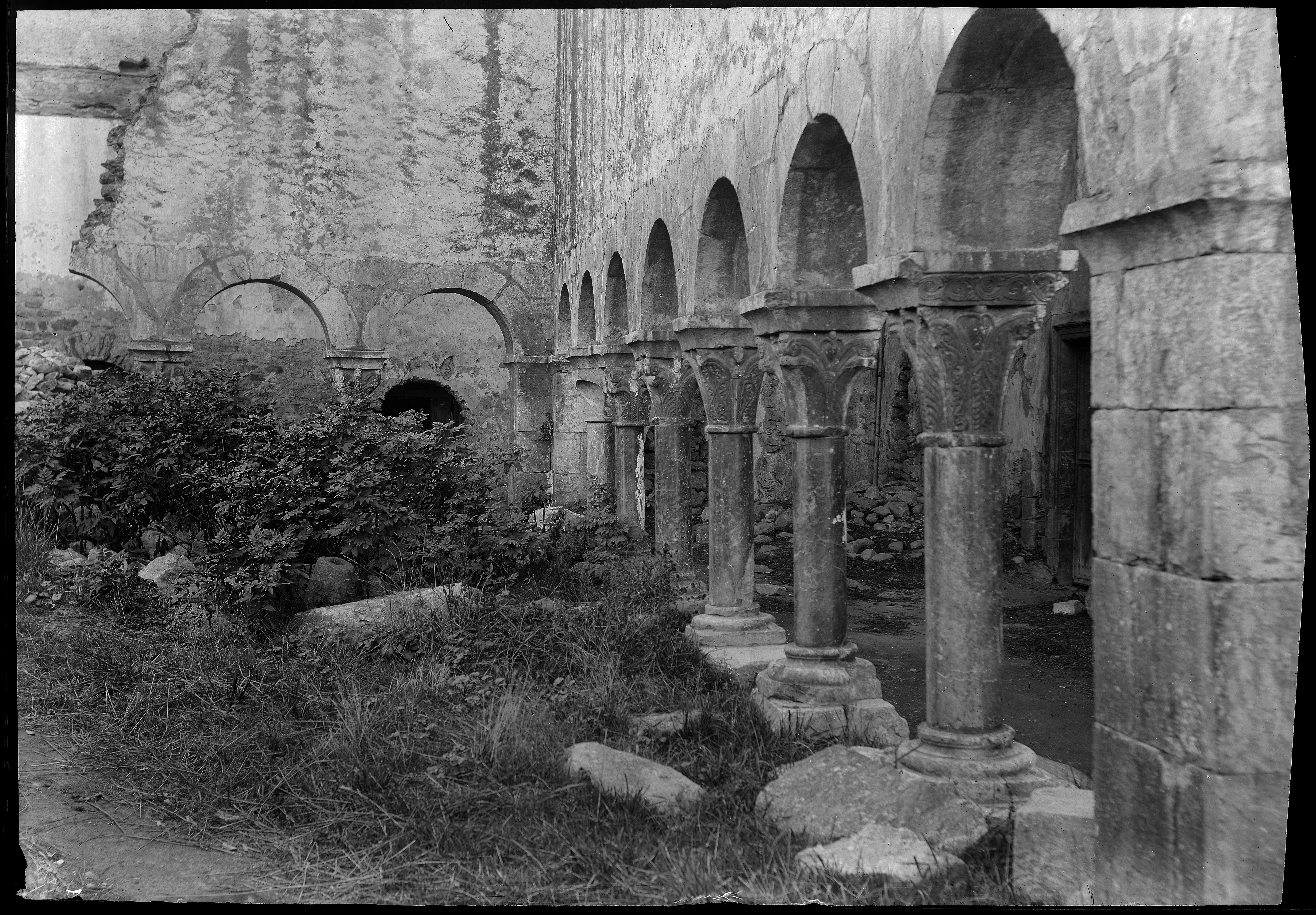 plaque négative au gélatino bromure d'argent, format 15x21 cm. Inscription manuscrite par Eugène Trutat sur l'enveloppe : " Abbaye St Michel de Cuxa - cloître "